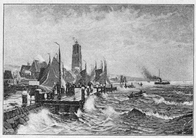 Hafen von Terschilling